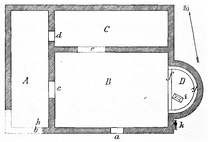 Der Plan der römischen Basilika in Šiprage aus dem 5. Jahrhundert. Abmessungen: 18,42x14,20 m.